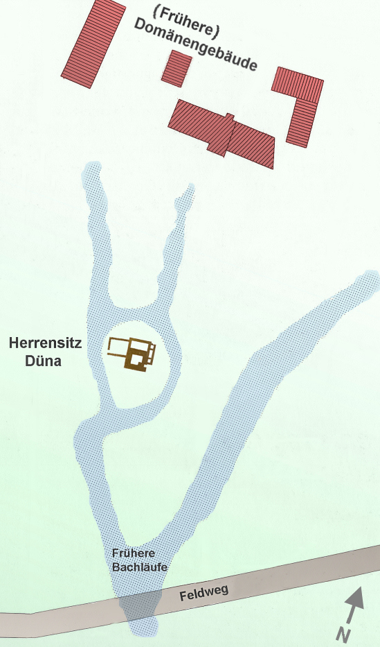 Geländeskizze von Düna mit Ausgrabungsfläche und Domänengelände